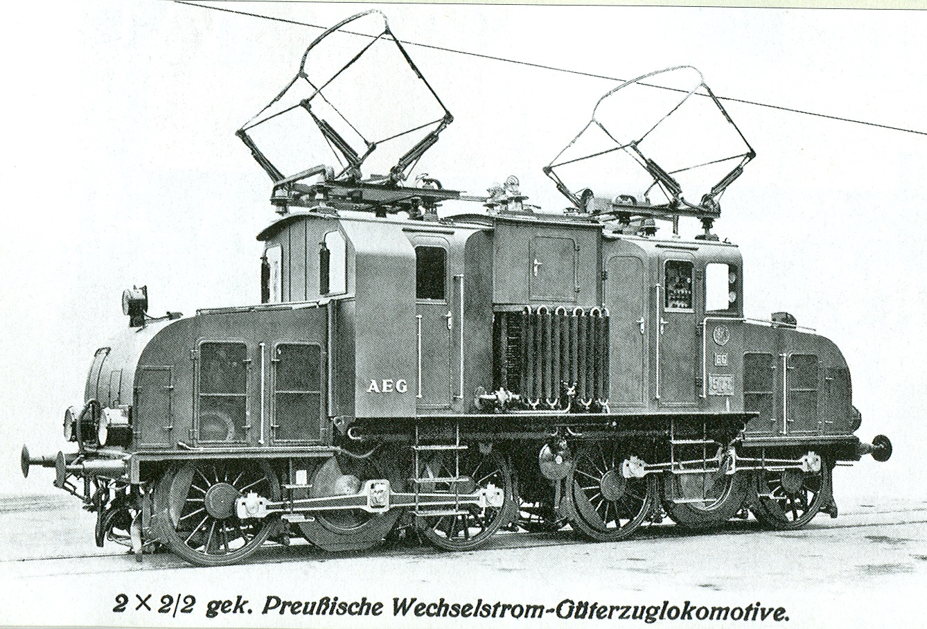 Werkfoto der AEG von der E 71.1